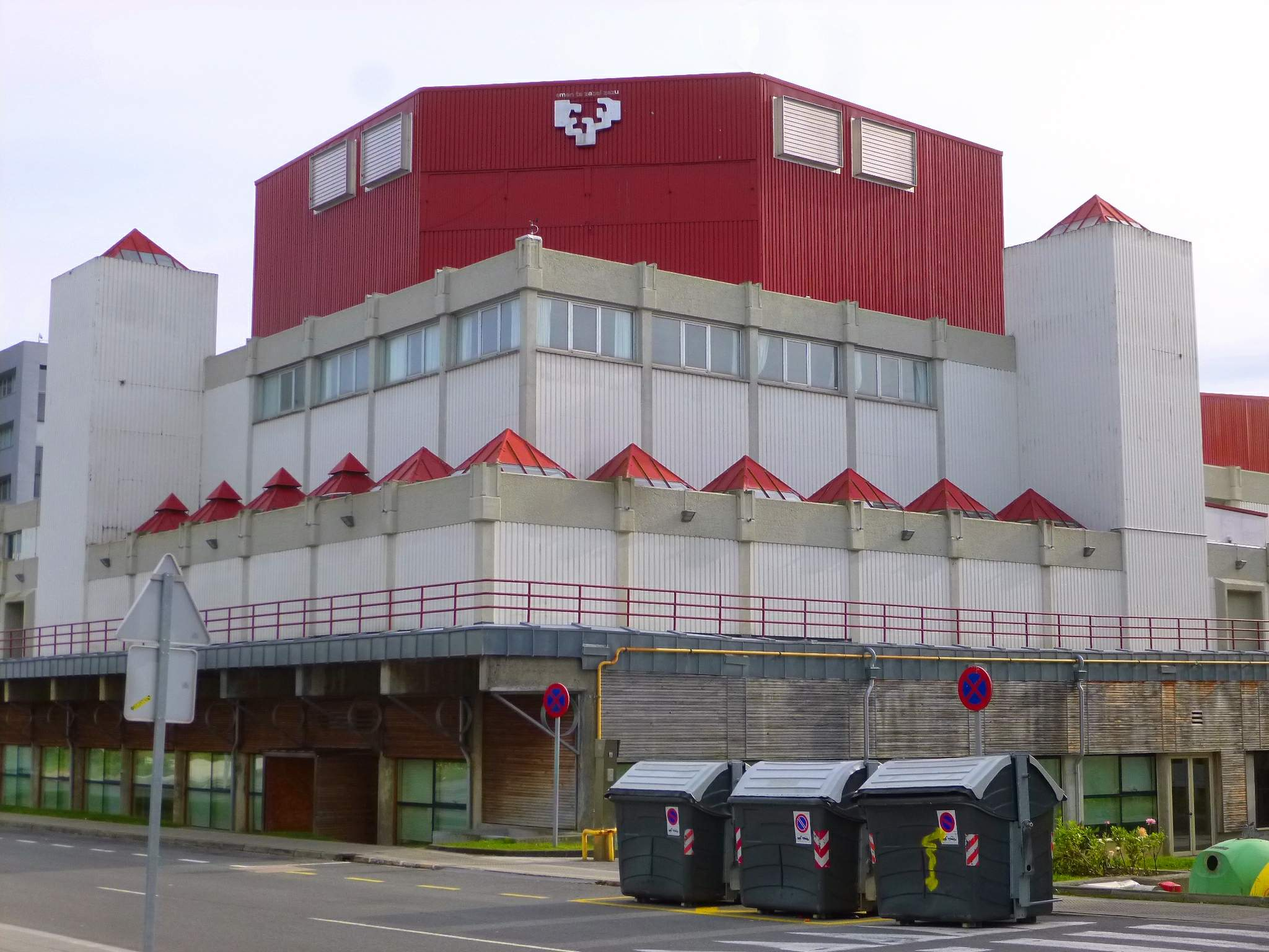 Lejona - Campus de Bizkaia de la UPV-EHU - Aula Magna